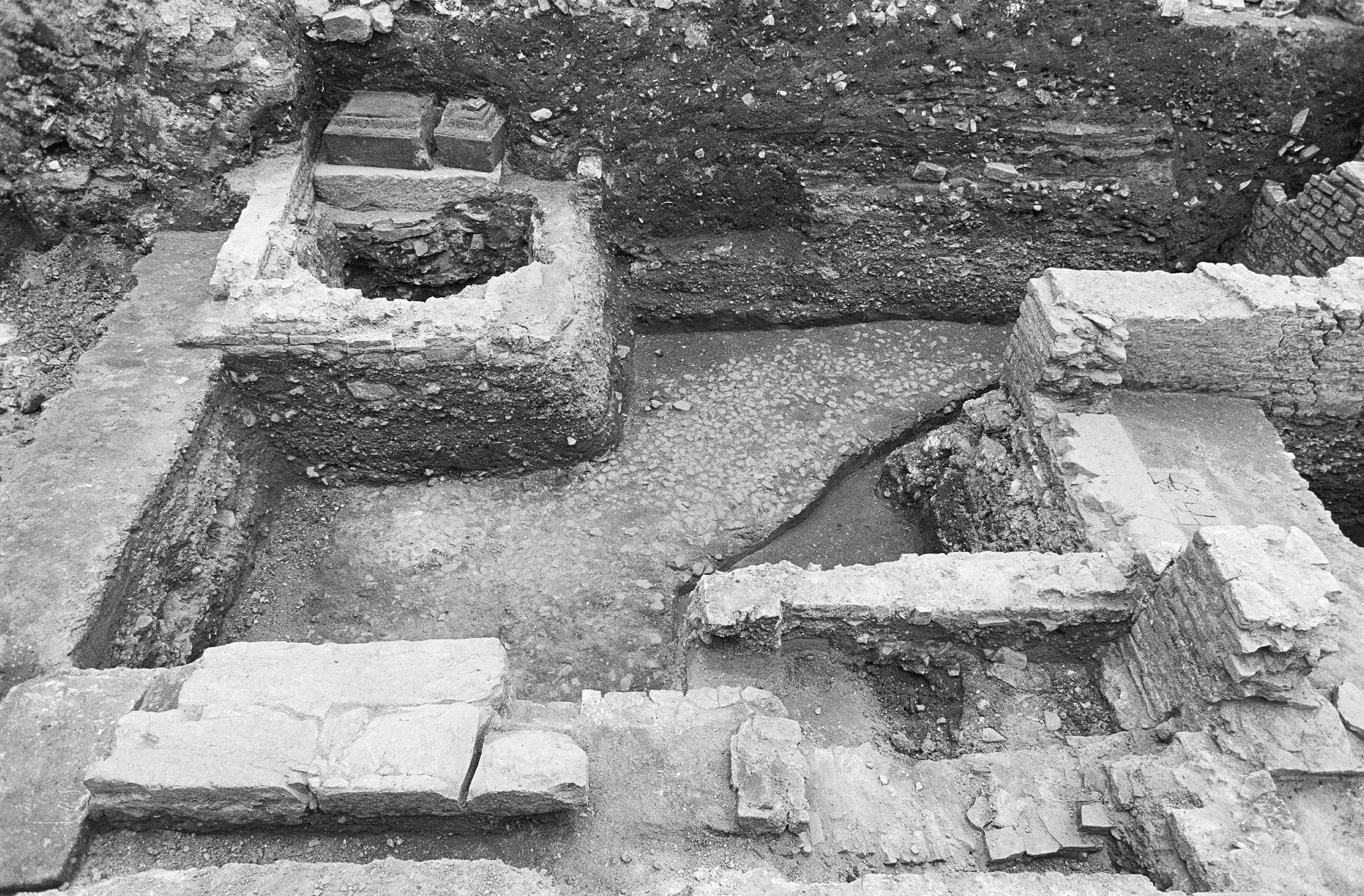 opgravingen